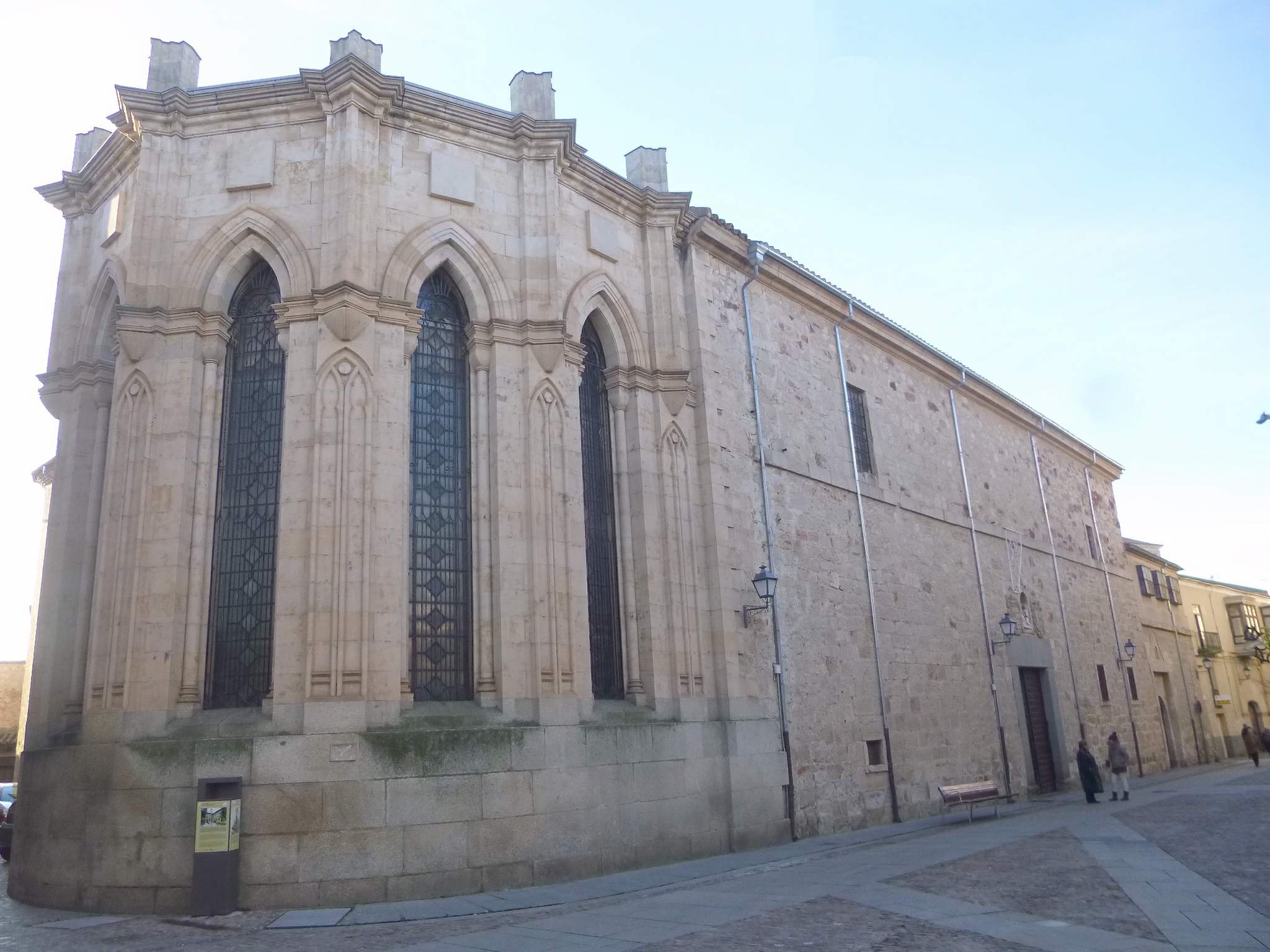 Zamora - Convento del Tránsito o del Corpus Christi